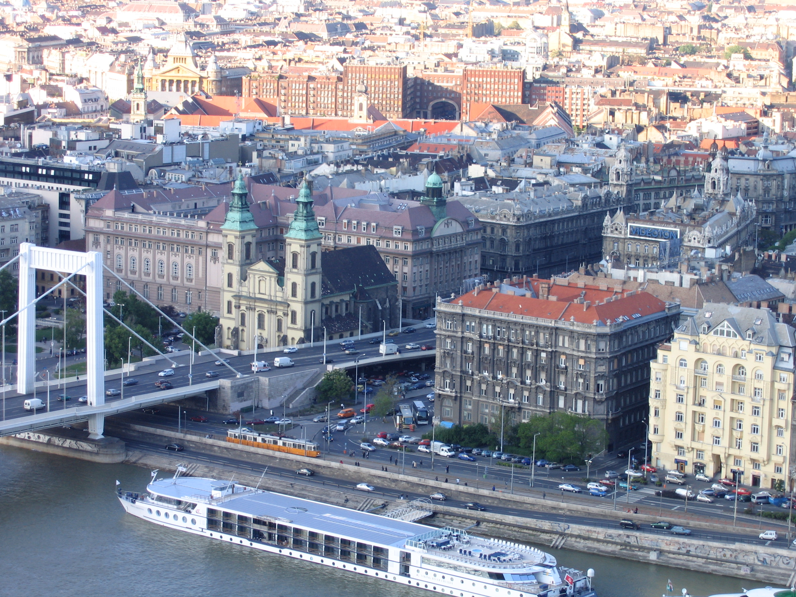 Budapest, Hungary